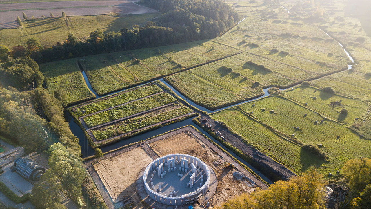 Polska replika Stonehenge wykonana przez Park Ewolucji w Sławutówku